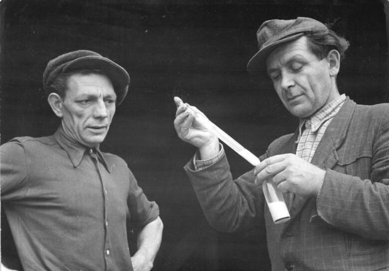 Prester-Zinksleben, Bauern eine Milchprobe nehmend Zentralbild Biscan Leu-He. 7.7.1952 Milch- und Fleischsoll wird vorfristig erfüllt. "Butter statt Kanonen" steht an den Rinderställen des Stiftsgutes Prester-Zinksleben bei Magdeburg. " Das soll aber nicht heissen, dass wir uns nur um die Erfüllung unseres Solls kümmern. " erklärt Melkermeister Karl Fischer. " Wir wissen sehr gut, dass wir alles daran setzen müssen, die Einheit und den Frieden zu erkämpfen. Ich habe mich nicht nur verpflichtet, den Milchertrag meiner Kühe zu steigern und das Milch- und Fleischsoll vorfristig zu erfüllen, sondern habe auch noch einen Grossteil der Arbeit meines Sohnes übernommen, der zur Volkspolizei gegangen ist". UBz: "Herbert Gärtner, Viehwirtschaftsberater der BHG Pechau (rechts) nimmt die Milchleistungsprüfung im Stiftsgut vor. Er bestätigt, dass sich die Leistung erhöht hat, seit Melkermeister Fischer (links) die Kühe betreut; von einem Jahresdurchschnitt von 2800 Liter je Kuh brachte es Fischer in einem Jahr auf 4000 Liter. Der Fettgehalt der Milch stieg dabei in derselben Zeit von 3, 24 auf 3, 4 %.